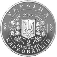 Ukrainian Coin Avers 1996 Характеристики монеты Номинал: 2000000 карбованцев Тираж: 10000 шт. Материал: серебро 925 Качество: пруф Диаметр: 38,61 мм. Вес: 31,10 гр. Гурт: рифленый